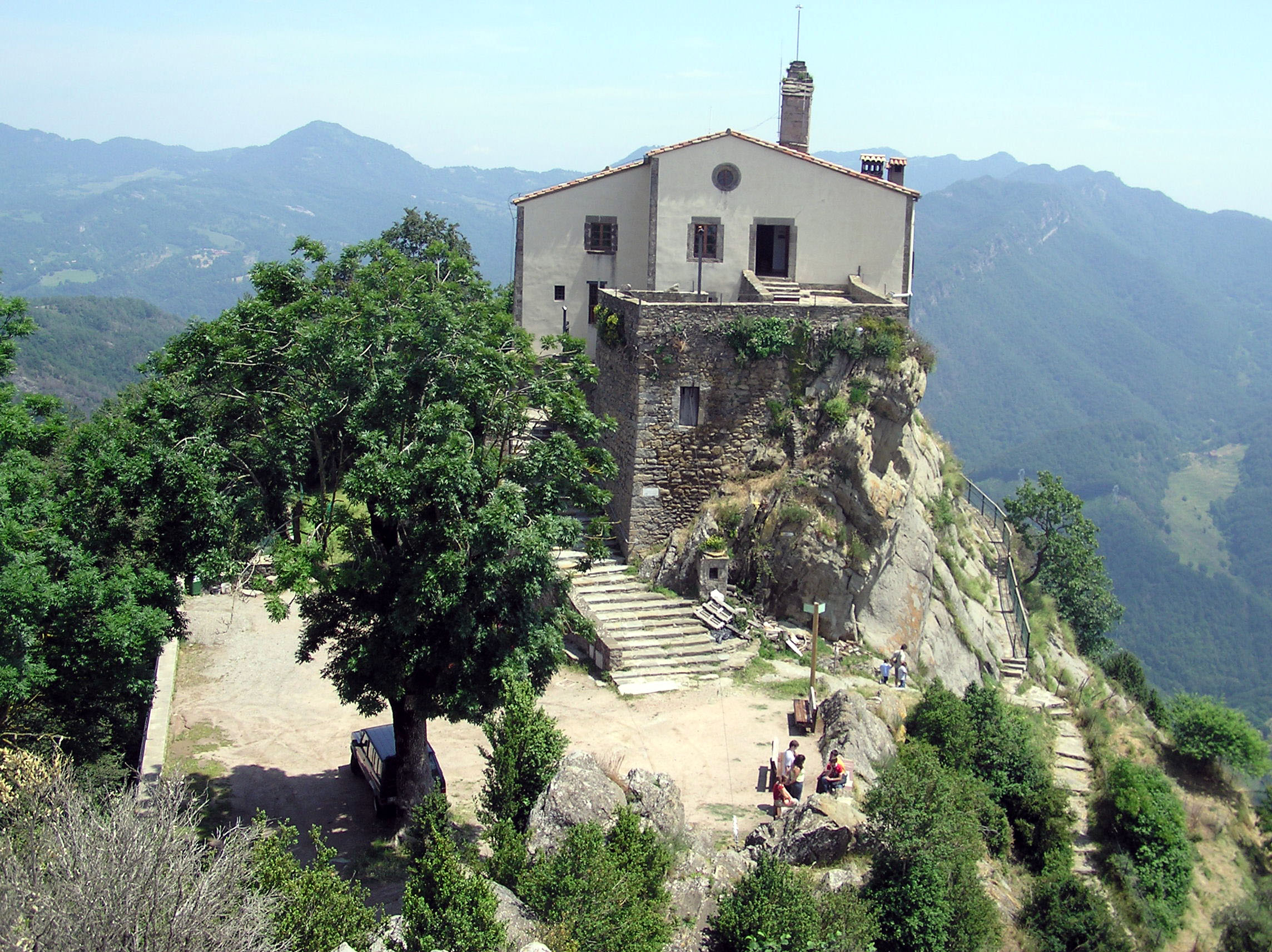 Fotografía del Santuario de Nuestra Señora de Bellmunt desde la antena de comunicaciones.